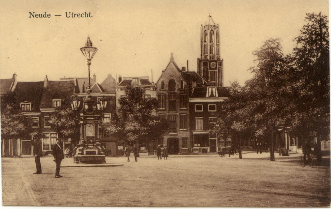 Oude ansichtkaart met spiegelverkeerd o.a. de openbare pomp op de Neude in Utrecht. In 1886 werd de waterpomp geplaatst, in 1932 weggehaald.